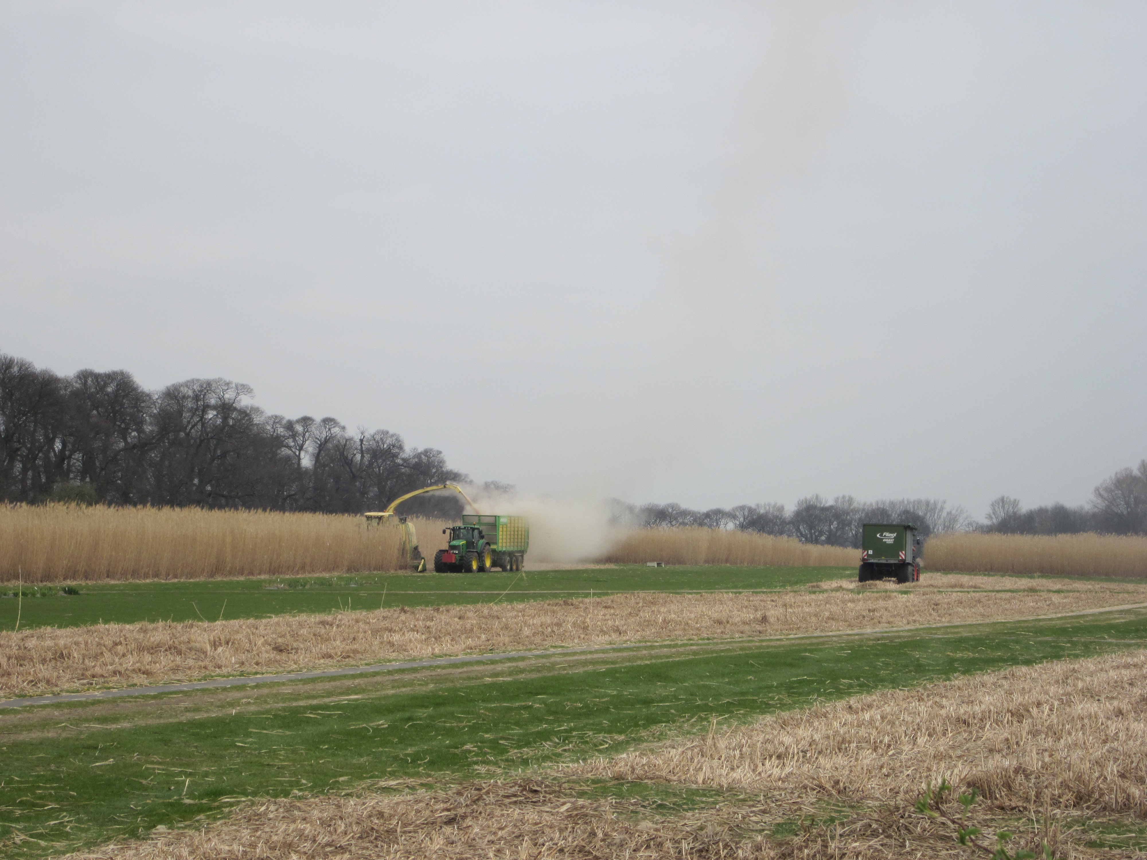 Miscanthus Ernte durch Firma Sieverdingbeck bei Schloss Dyck in NRW